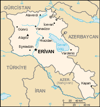 CIA World Factbook haritasının Türkçe çevirisi.